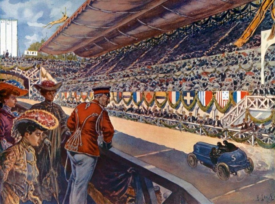 Léon Théry devant Guillaume II en 1904 (coupe Gordon Bennett) - La Vie au Grand Air du 22 décembre 1904